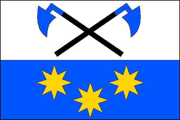 Vlajka obce Sulimov